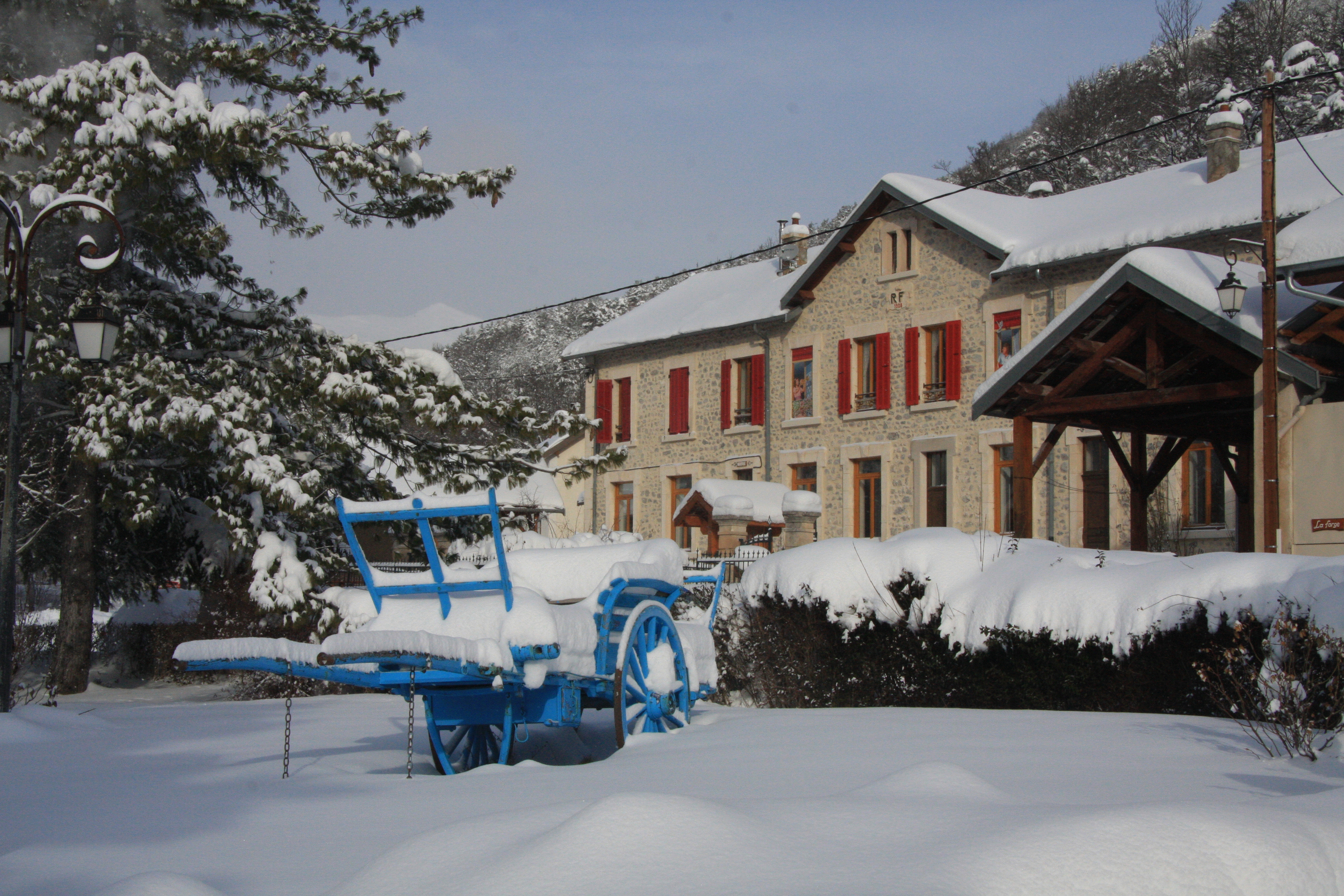 St Julien en Beauchêne la mairie